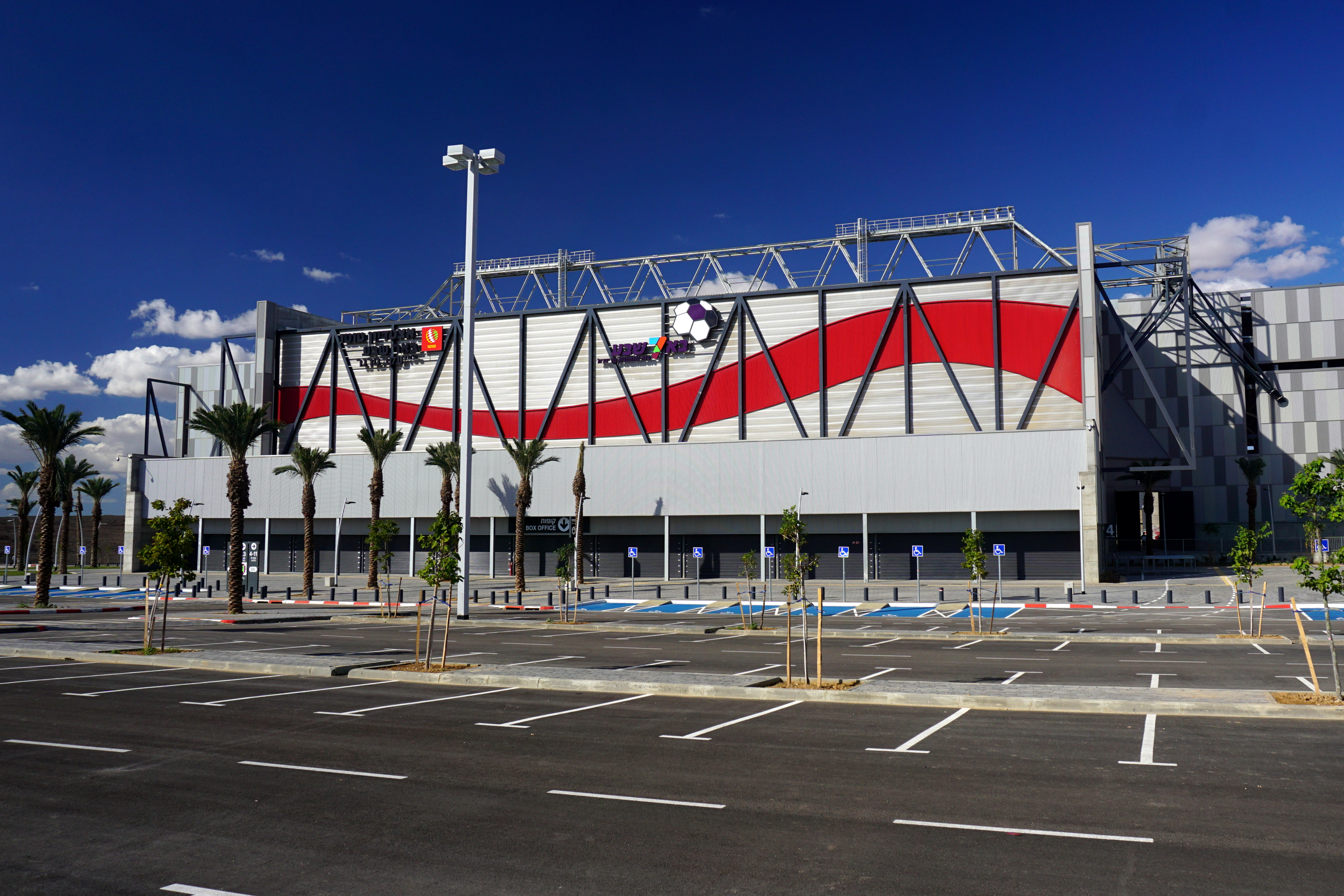 אצטדיון טוטו באר שבע ע"ש יעקב טרנר